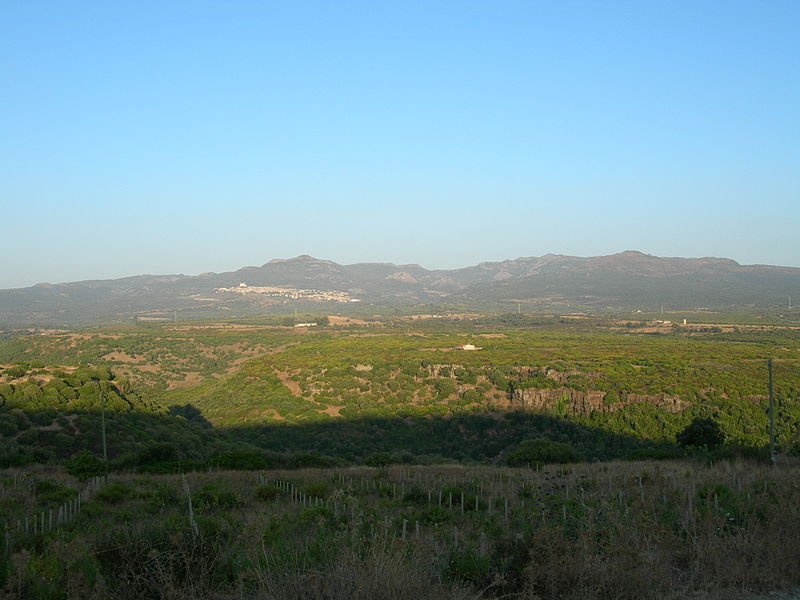 Veduta del Montiferru con il Comune di Cuglieri